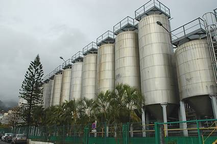 Brasserie de Bourbon brewery